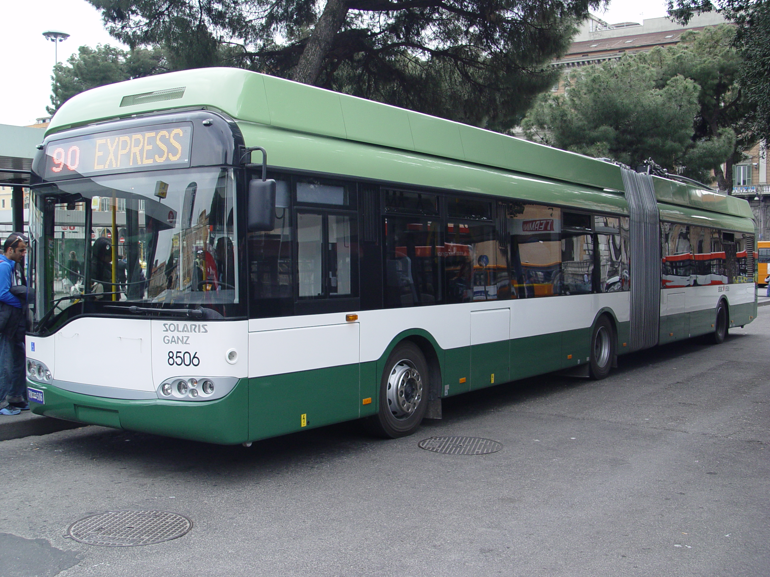 autobus elettrico/filobus